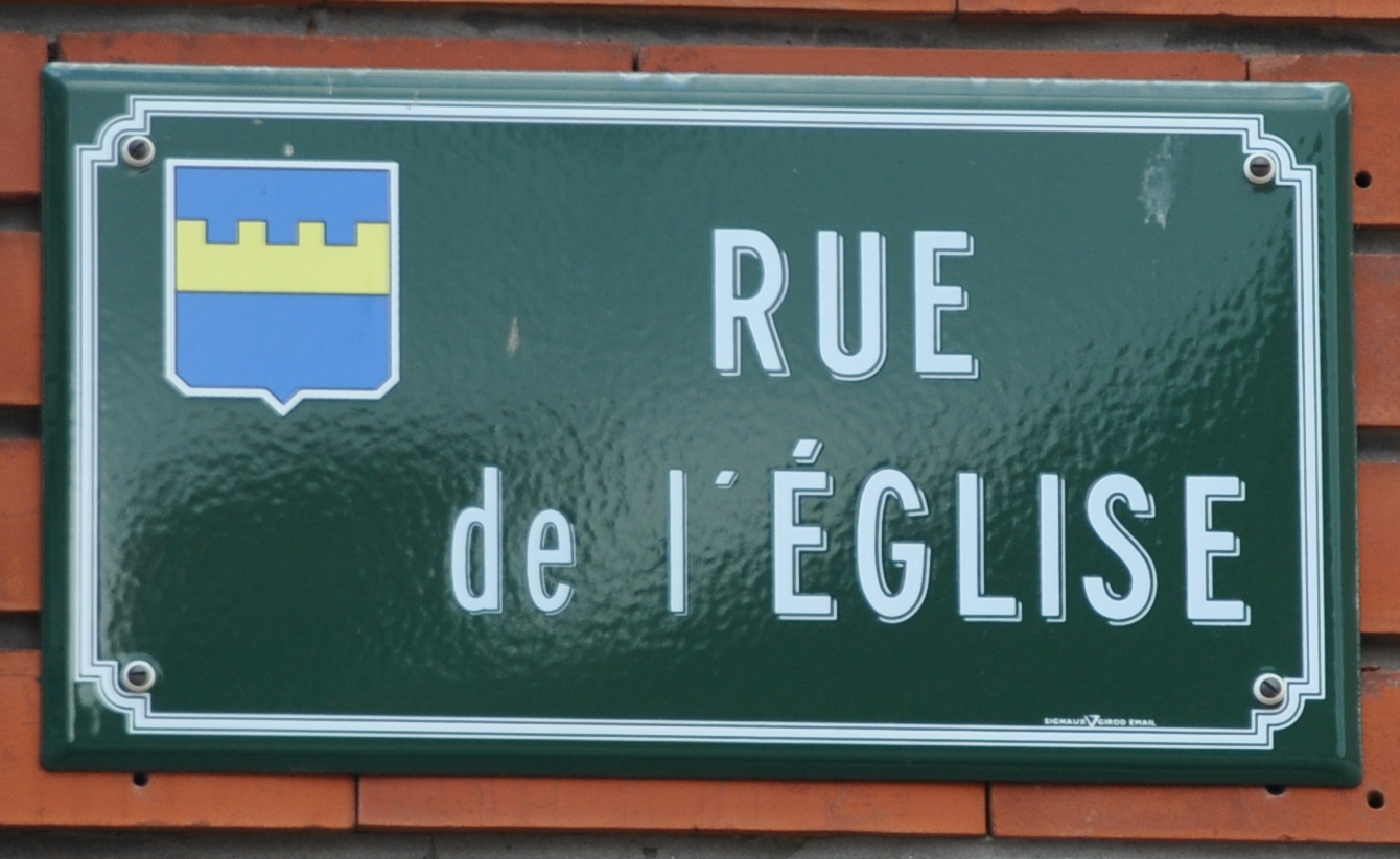 Allouagne, Rue de l'Eglise